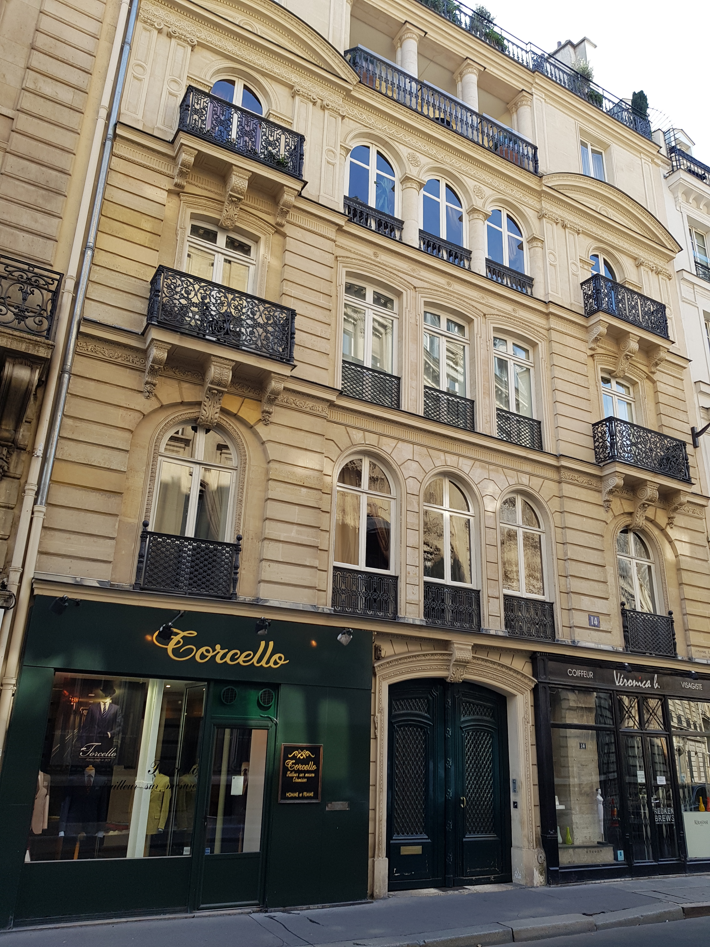 Immeuble du 14, rue des Saussaies, Paris 8e.